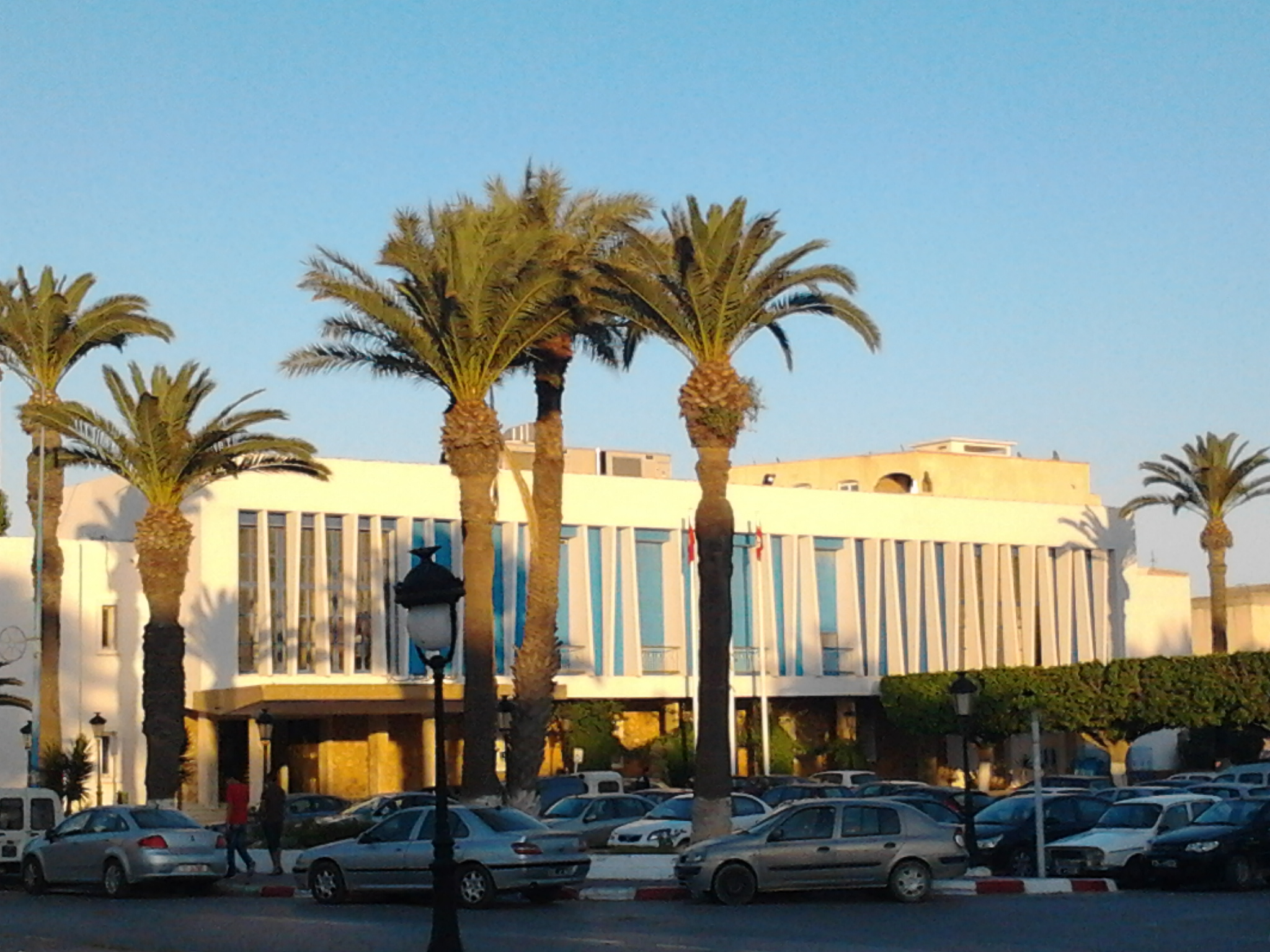 Palais de la municipalité